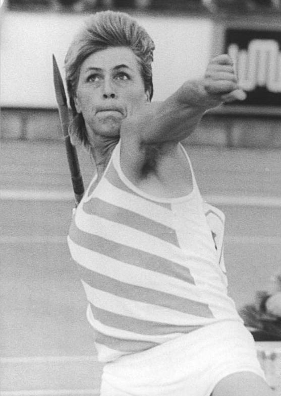 Petra Felke ADN-ZB Kluge 4.6.88 Jena: Leichtathletik-Olympia-Qualifikation- Petra Falke (SC Motor Jena) gewann das Speerwerfen am 3.6. mit der Jahresweltbestleistung von 78,14 m.